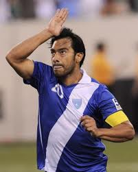 Carlos Ruíz haciendo su característica celebración, imitando la aleta de un pez.